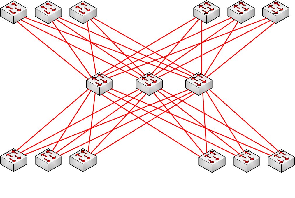 Figură în care se relatează o metodă greșită de redundanță